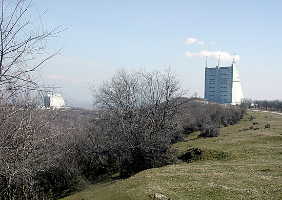 Габалинская РЛС